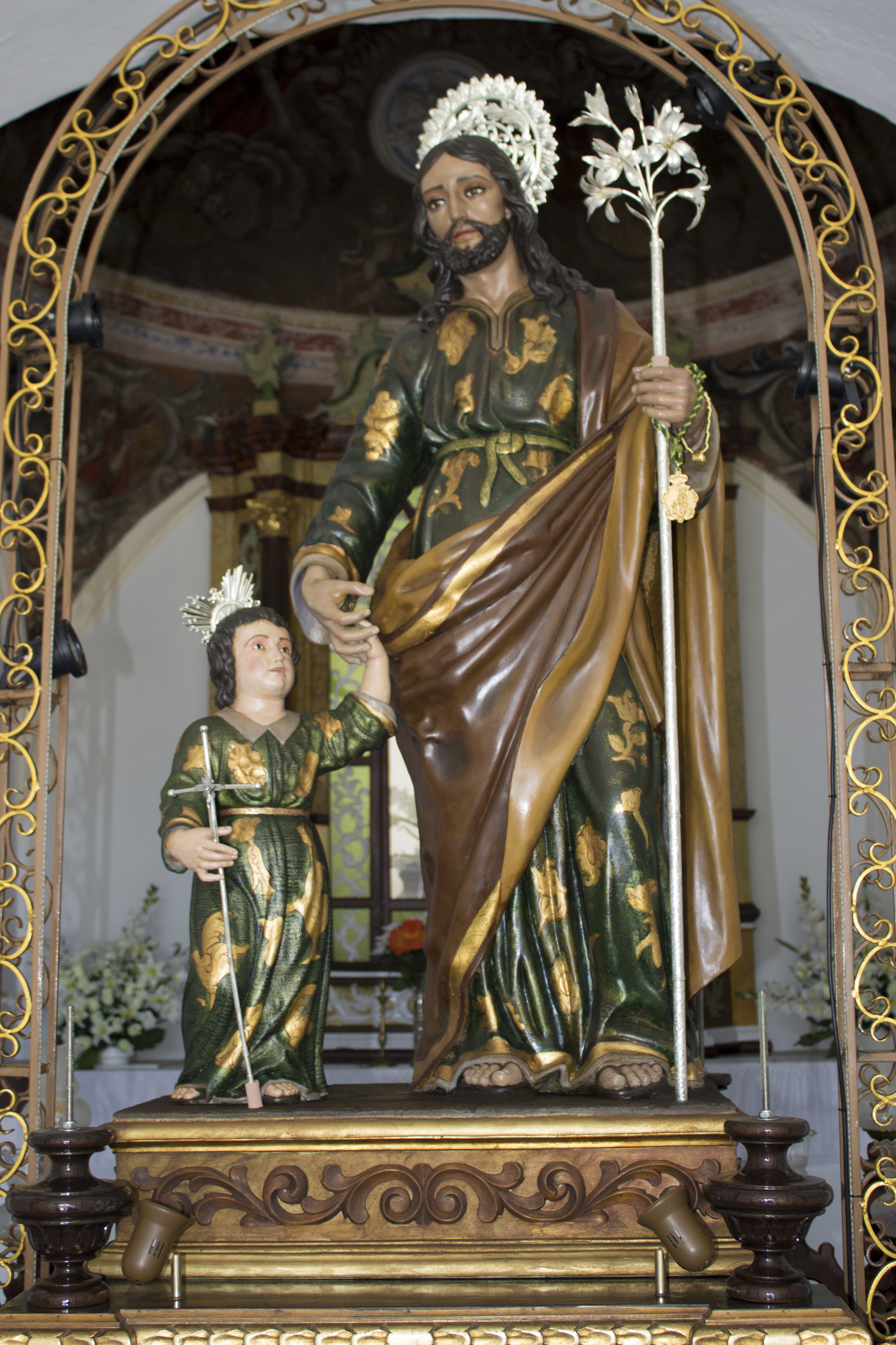 San Jose con la reforma de 2016